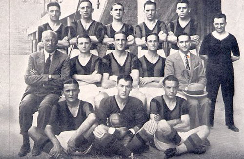 A line-up of Bologna S.C. in the 1928–29 season. From left to right, top: F. Busini (I), G. Della Valle, A. Schiavio (captain), A. Busini (III), G. Muzzioli, Bortolotti (masseur); middle: H. Felsner (coach), P. Genovesi, G. Baldi, A. Pitto, Bonaveri (president); bottom: E. Monzeglio, M. Gianni, F. Gasperi.